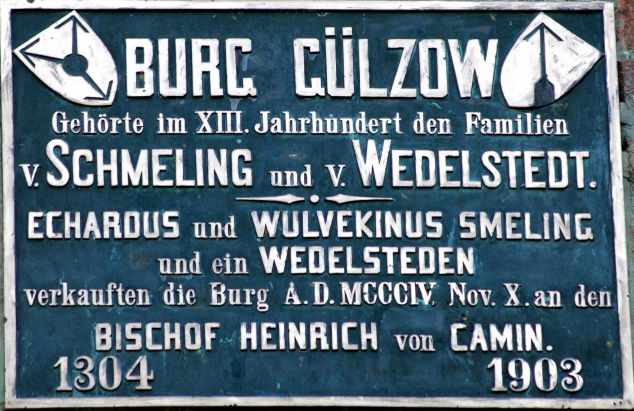 Tablica na Wieży Zamkowej w Golczewie.